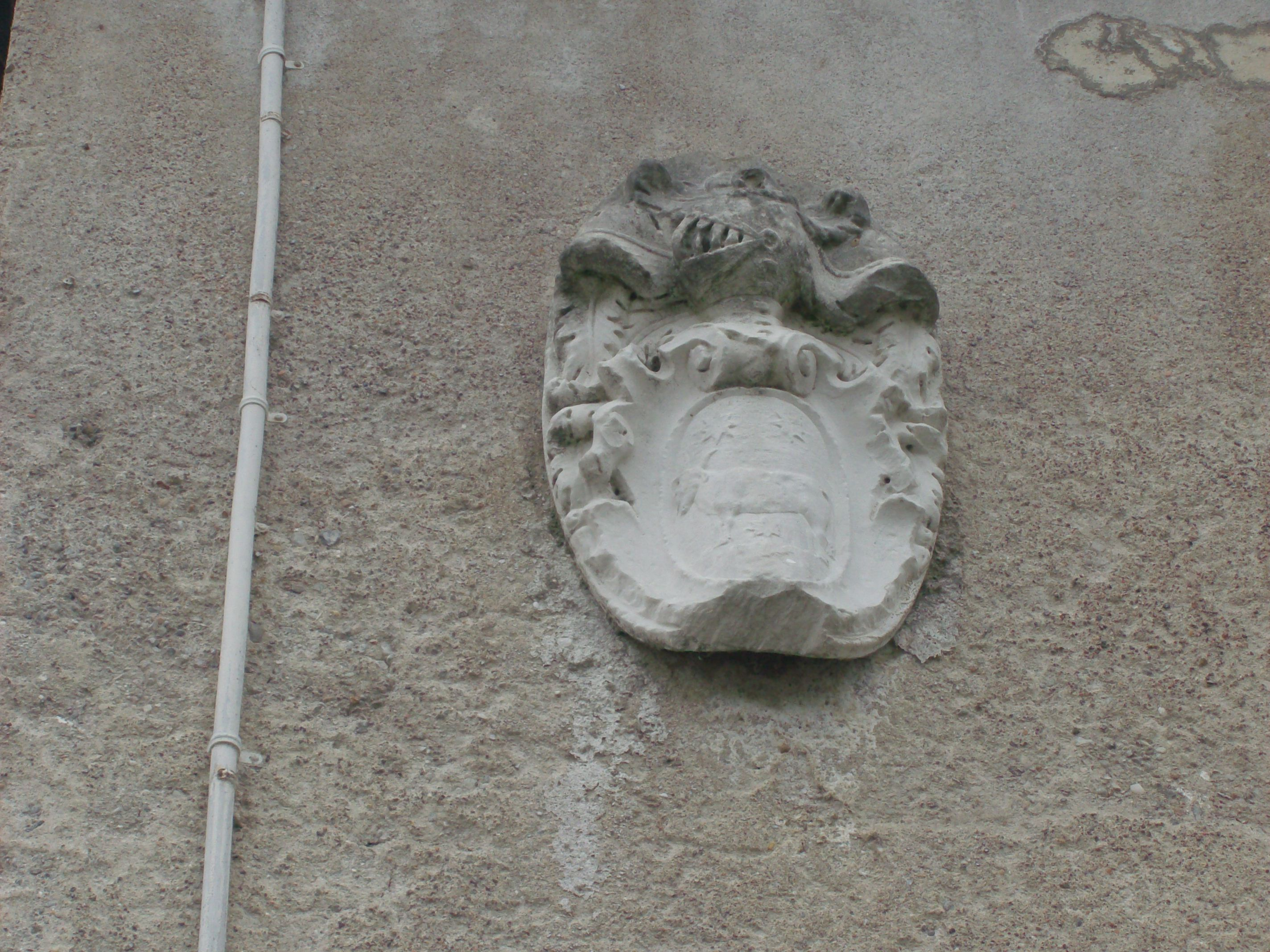 Stemma della nobile famiglia del Bue nella facciata della Cascina Guasconcina. Descrizione araldica (blasonatura): d'azzurro, al bue fermo sopra un ristretto di terreno, al naturale accompagnato da tre stelle (8 punte) d'oro (Andrea Borella, "Annuario della Nobiltà italiana", Edizione XXXI, Teglio (SO), 2010, S.A.G.I. Casa Editrice,vol. 1, pag. 891)